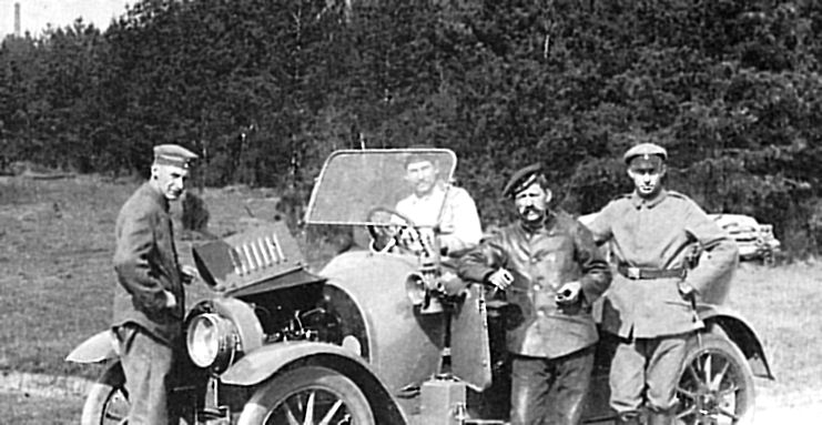 Kuva Libaussa jääkreille järjestetyltä moottoriajoneuvokurssilta vuodelta 1917.